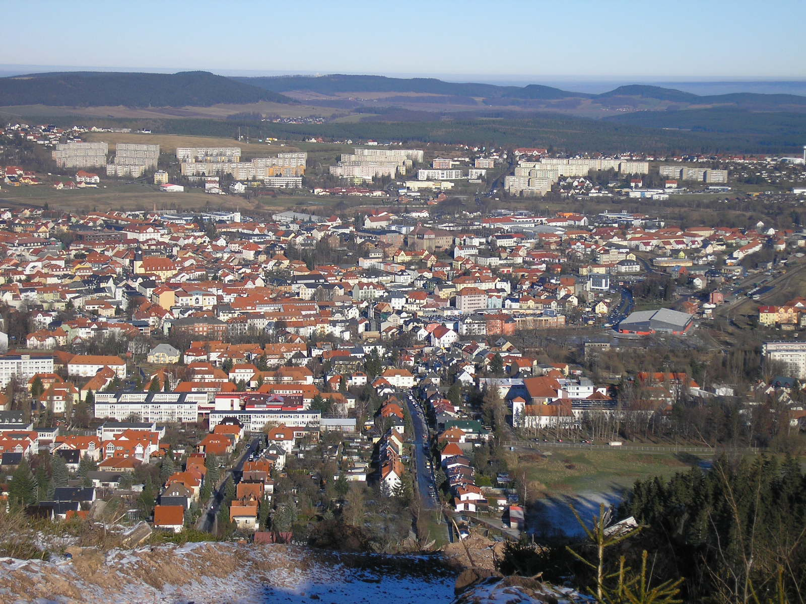 Blick auf das Stadtzentrum von Ilmenau, dahinter Pörlitzer Höhe (Plattenbausiedlung) und die Reinsberge vom Lindenberg aus.